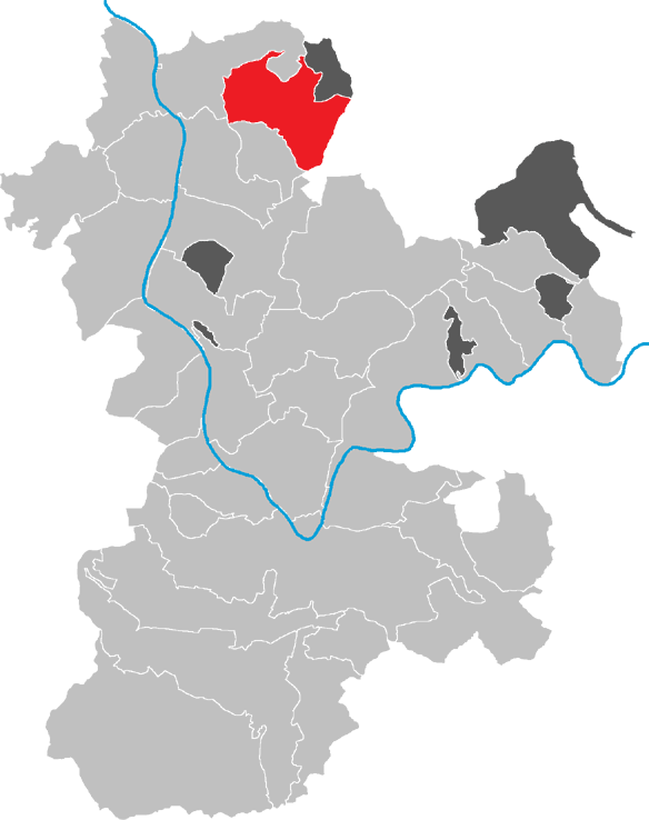 Karte von Leidersbach im Kreis Miltenberg, Bayern, Deutschland.